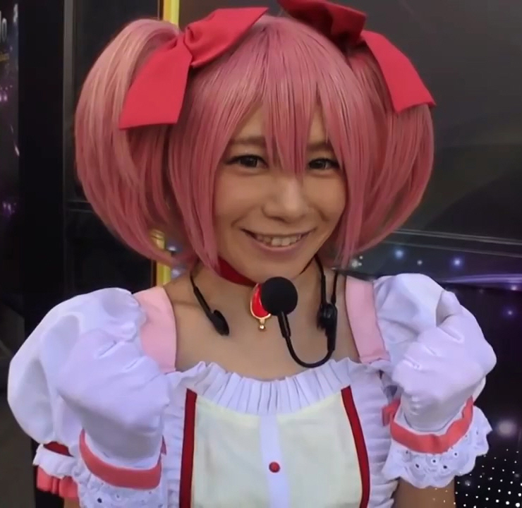 小西まりえ (2017.01.22)